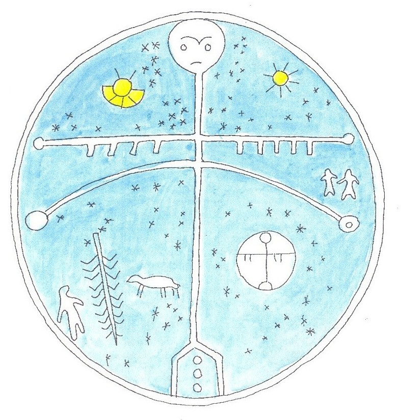 Sámándob rajza világfával, csillagképfigurákkal